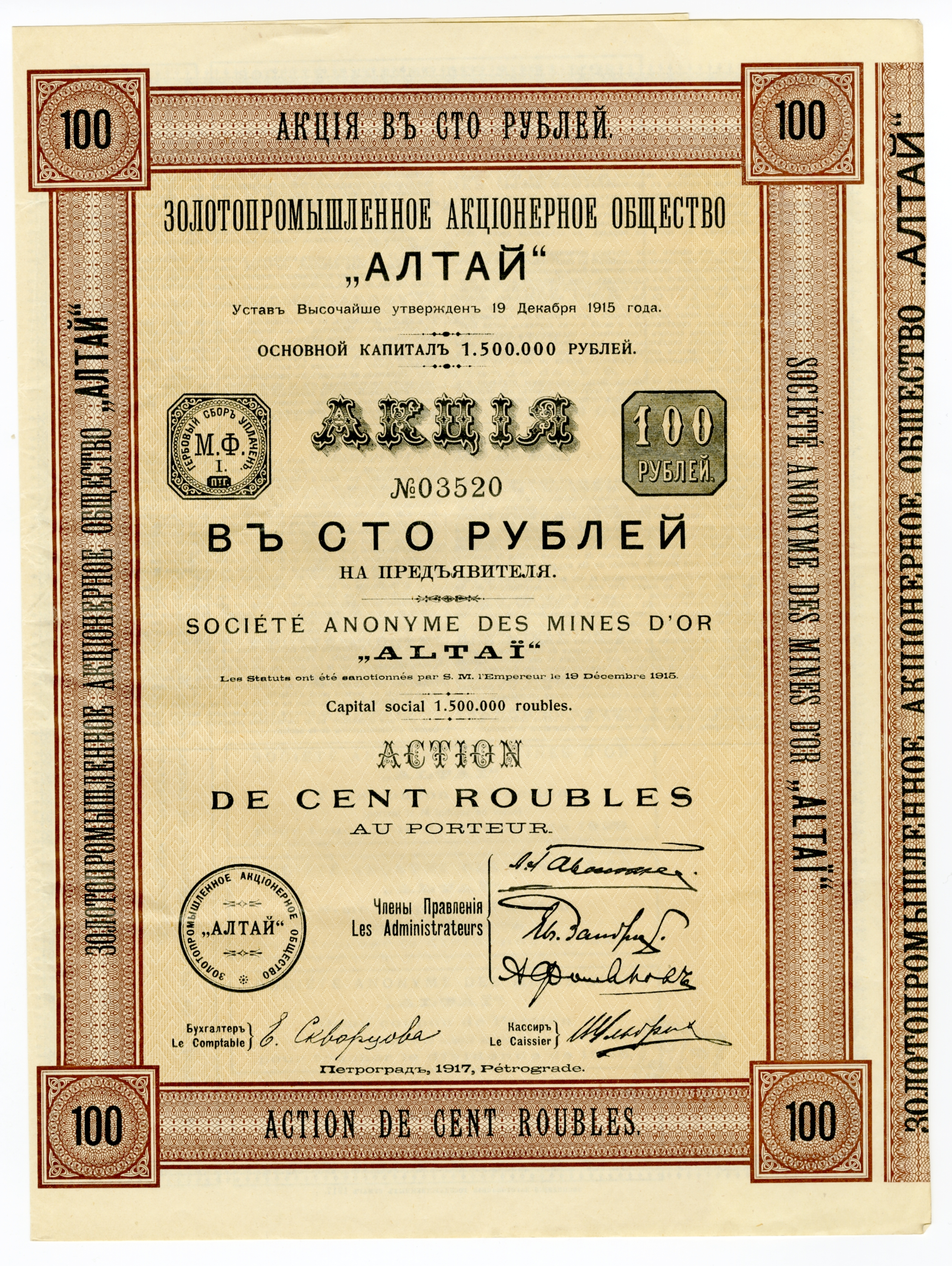 Акция в сто рублей на предъявителя Золотопромышленного акционерного общества "Алтай"